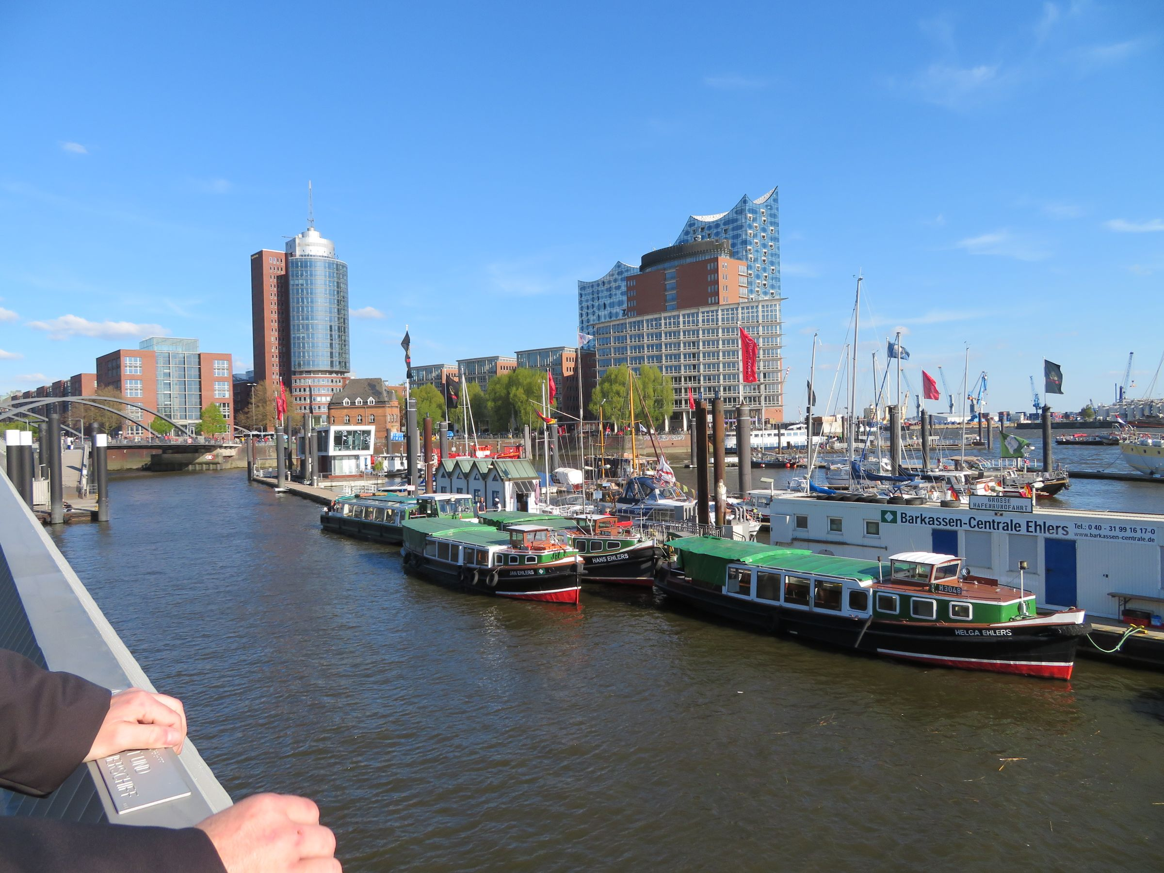 April 2017 in Hamburg